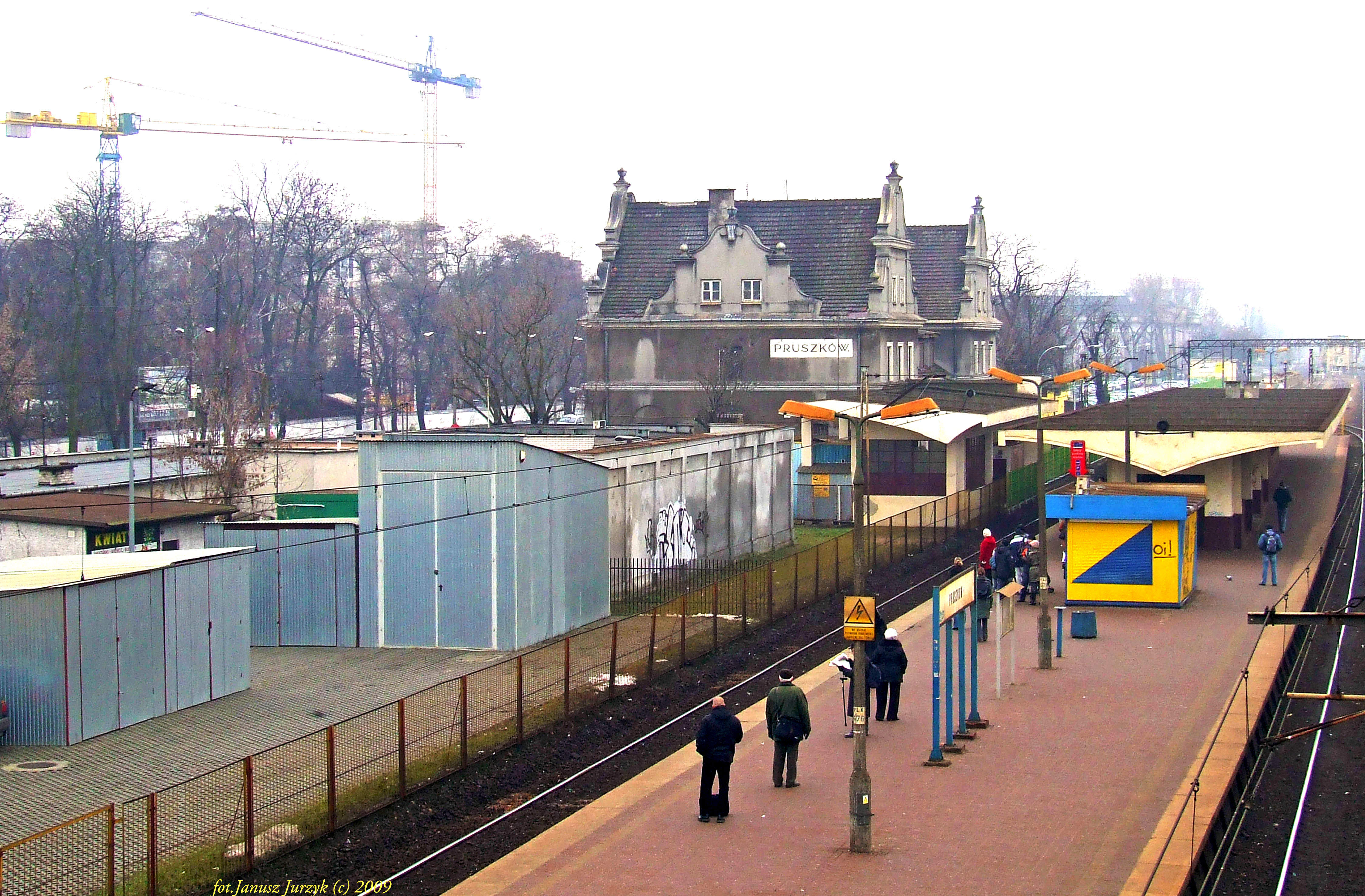 Stacja kolejowa w Pruszkowie.